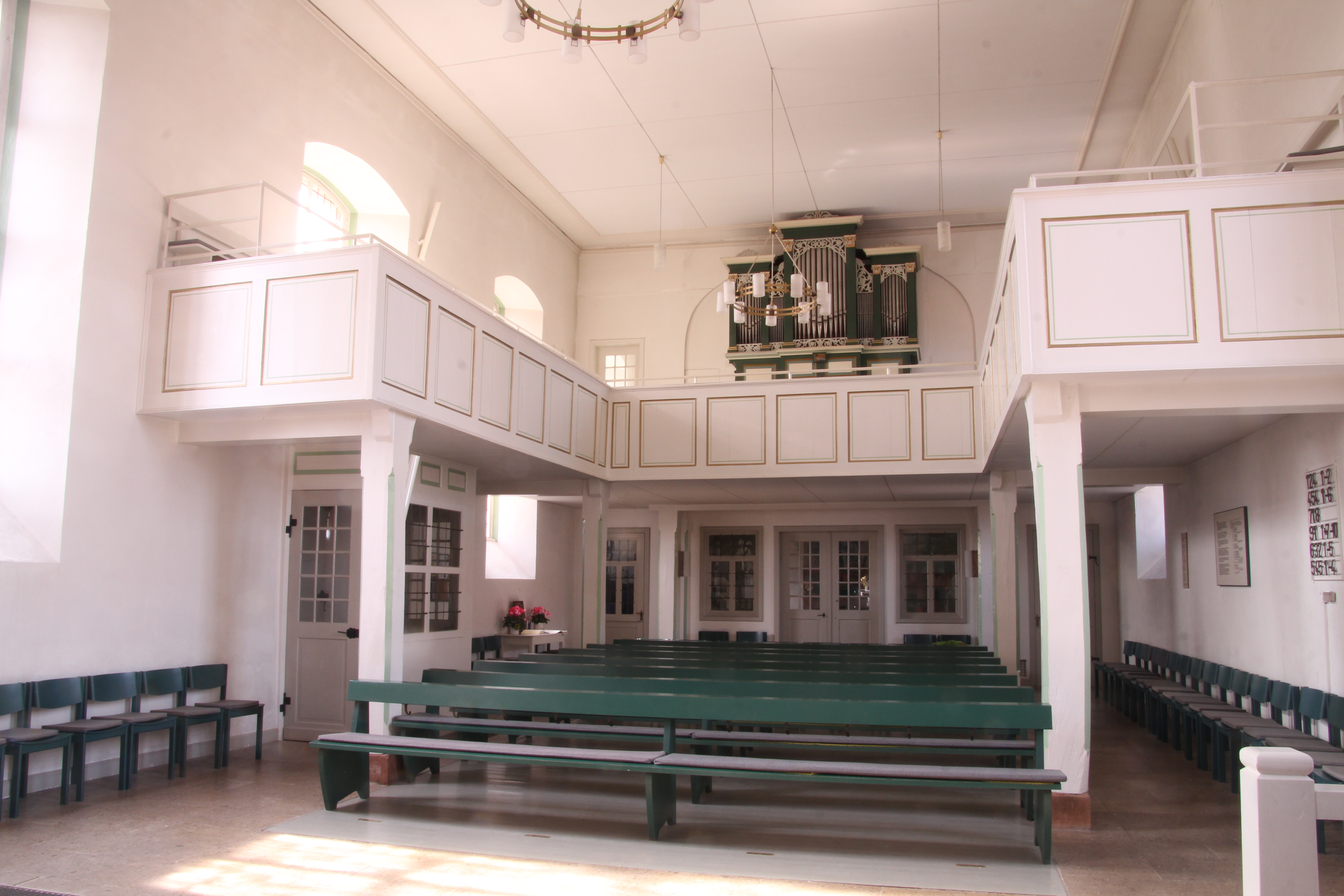 Siehe Bild und Dateiname